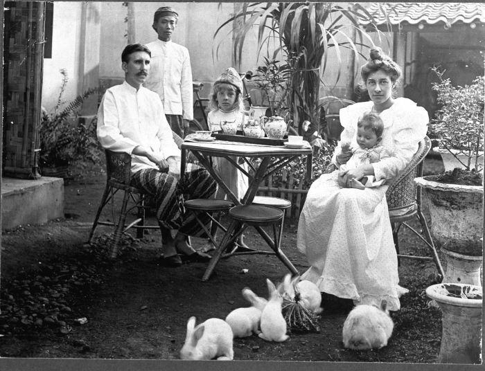 Foto. Het gezin J.J. Kunst in Tjimahi; Fritjof met theemuts en Betty met Tom op schoot